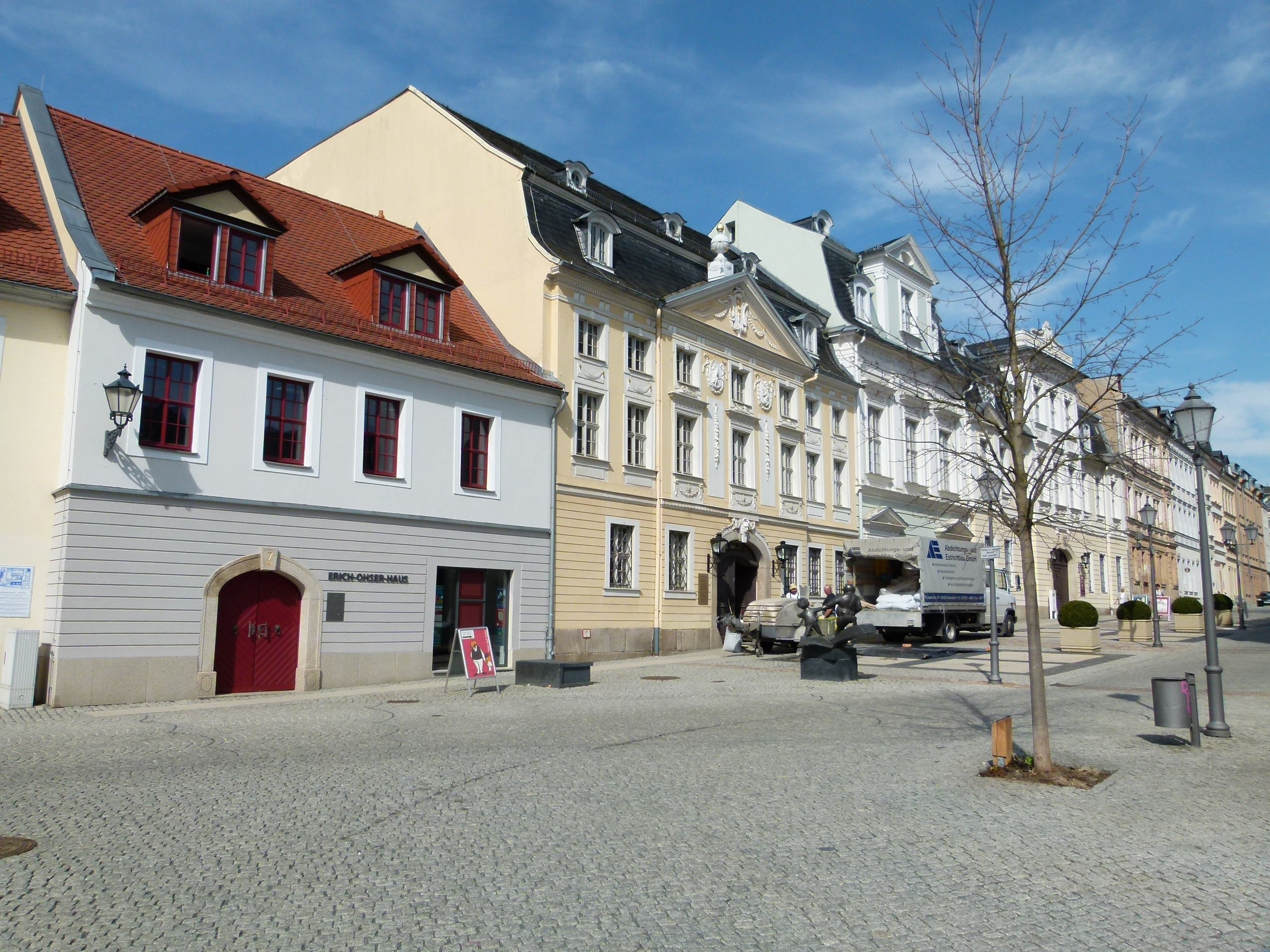 Denkmalgeschütztes Gebäude Nobelstraße 7-21, Plauen, Sachsen